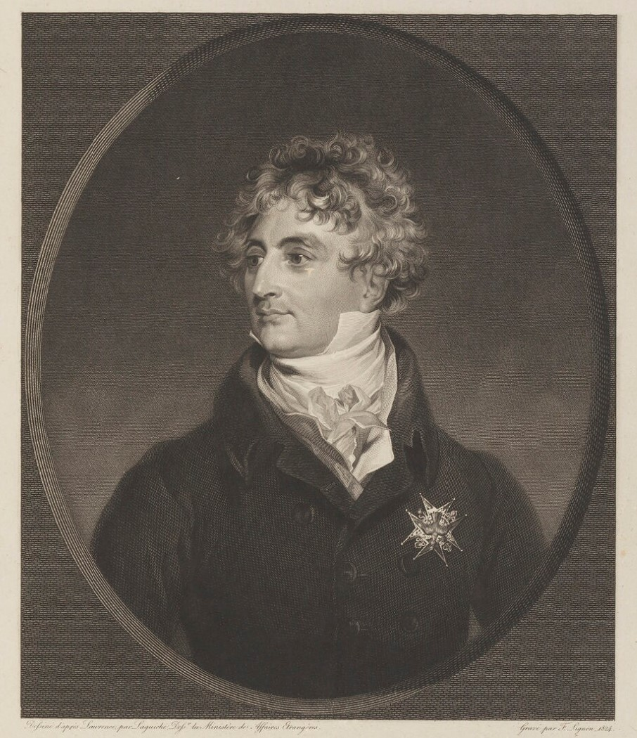 Portrait of Armand Emmanuel Sophie Septimanie du Plessis, duc de Richelieu